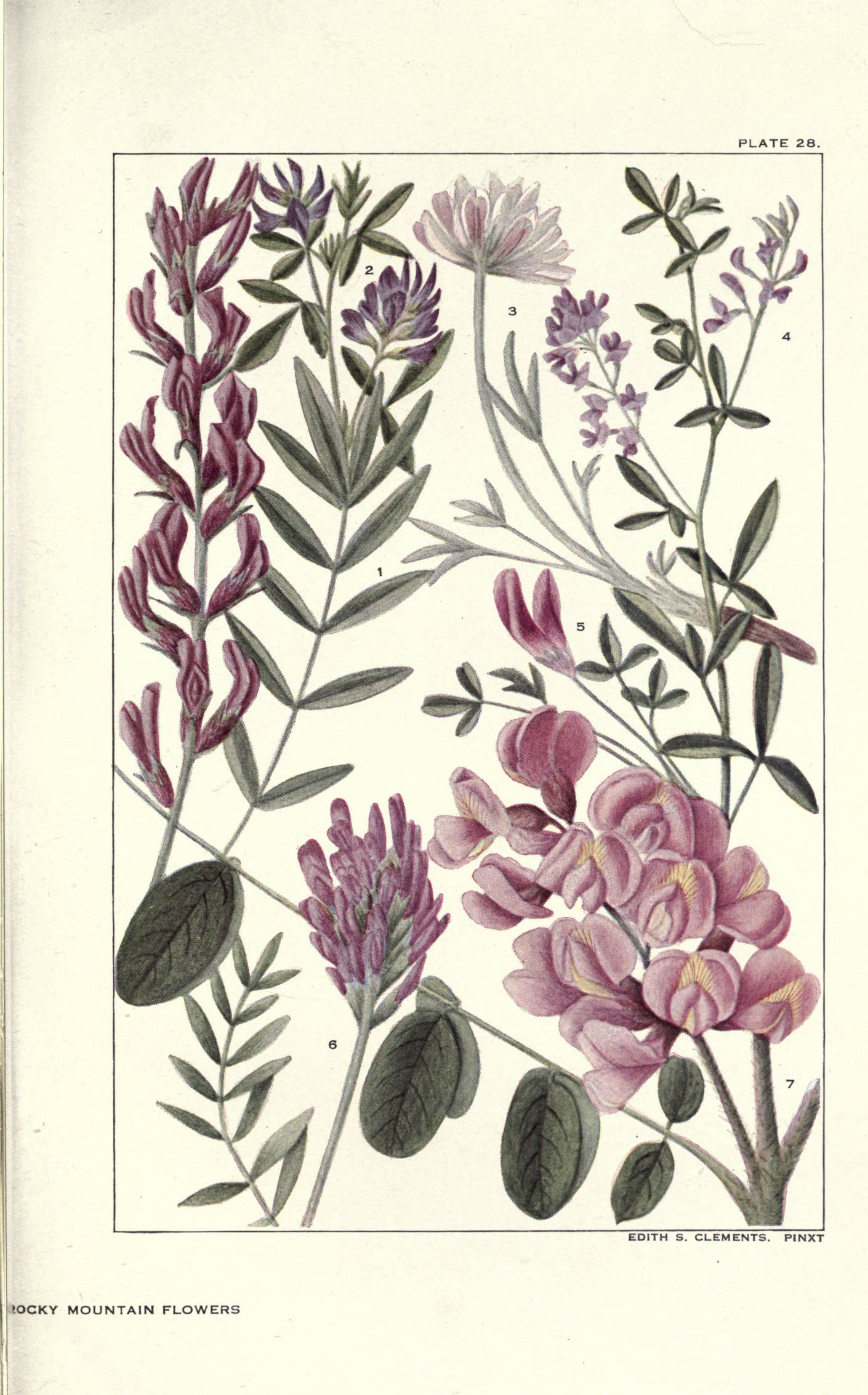 PLATE 28. Astragalus lambertii = Oxytropis lambertii Medicago sativa Trifolium dasyphyllum Psoralea tenuiflora Trifolium nanum Astragalus hypoglottis Robinia neomexicana